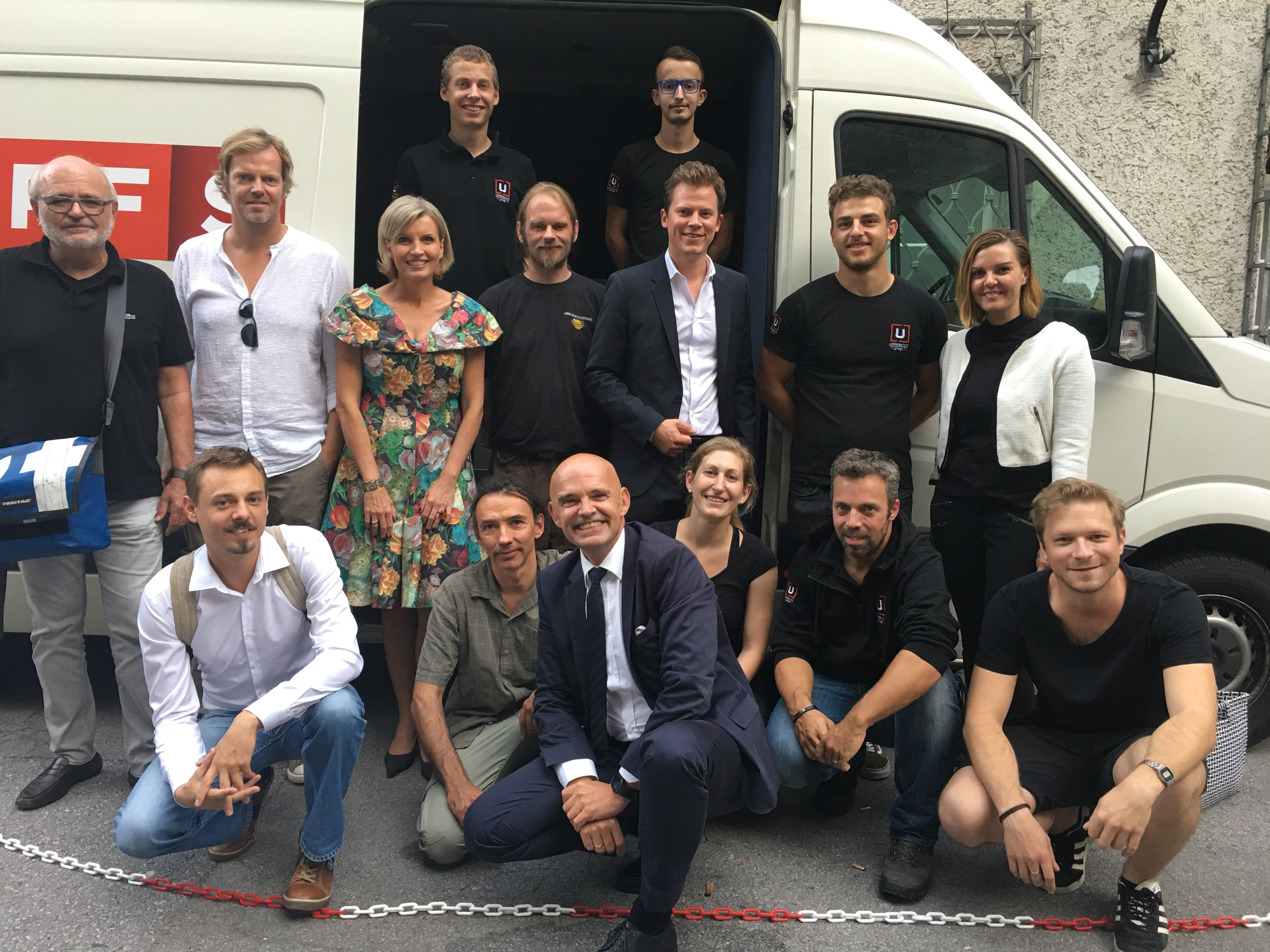 Mitarbeiter